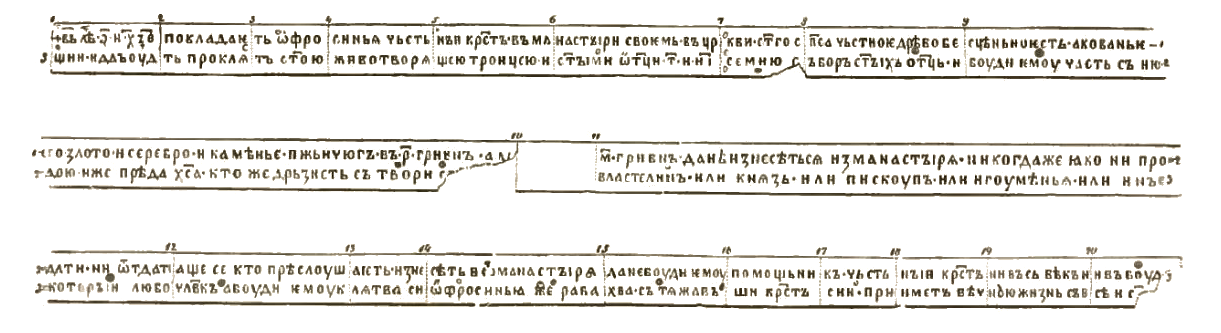 Иллюстрация книги «Белорусские древности» стр.125 илл.75